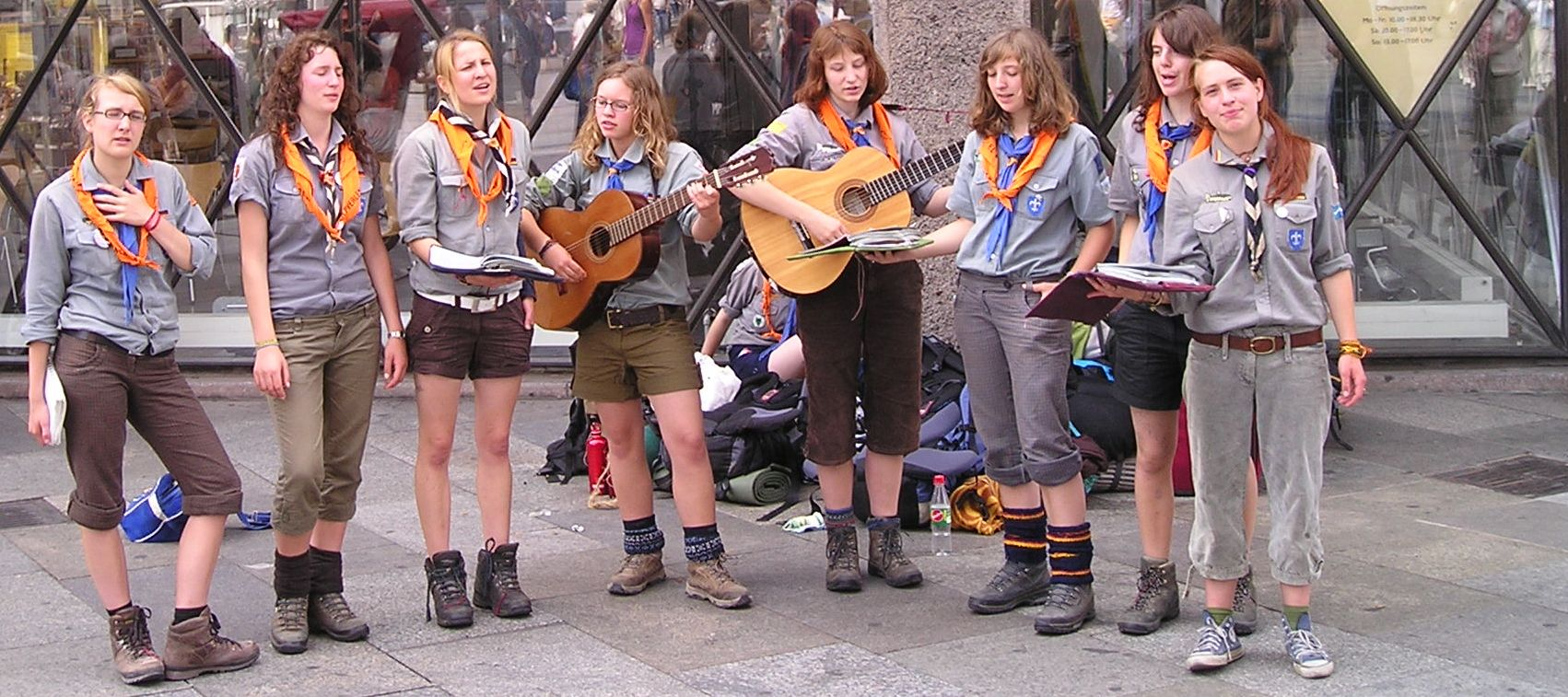 Am Schlusstag (10.06.2007) des Deutschen Evangelischen Kirchentages 2007 singen und musizieren Christliche Pfadfinder in der Nähe des Kölner Doms.